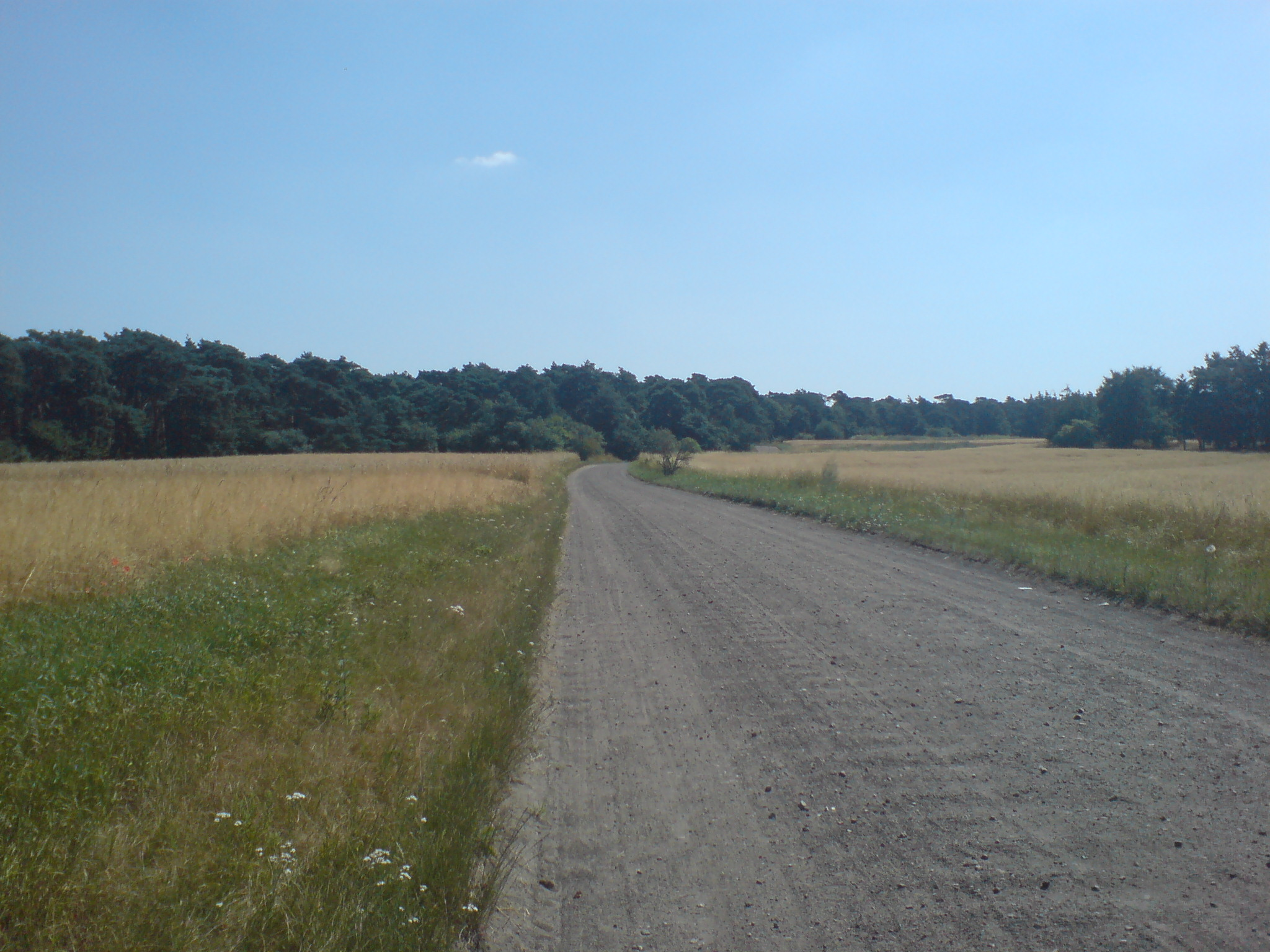 wjazd do lasu w Stęszewie